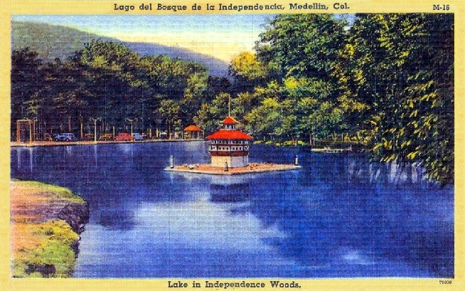 postal del Bosque de la Independencia Actual Jardín Botánico de Medellín, Colombia.